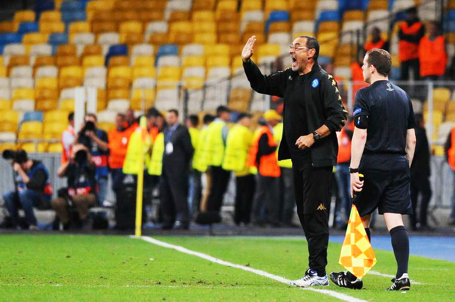 Maurizio Sarri as a coach of Napoli in 2016